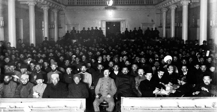 Участники третьего съезда мусульман России, Нижний Новгород (16 августа 1906)